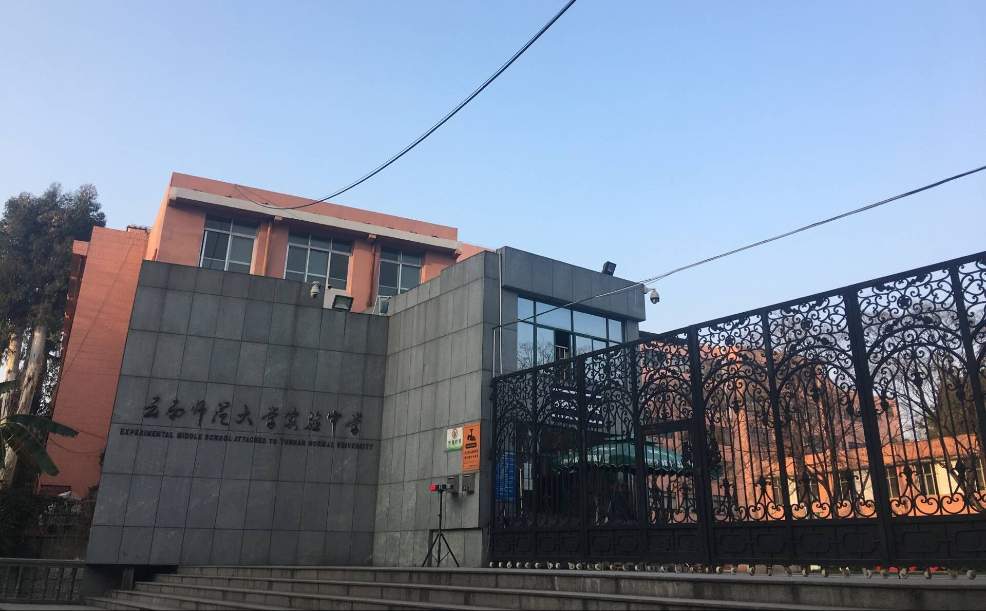 云南师范大学实验中学本部正门